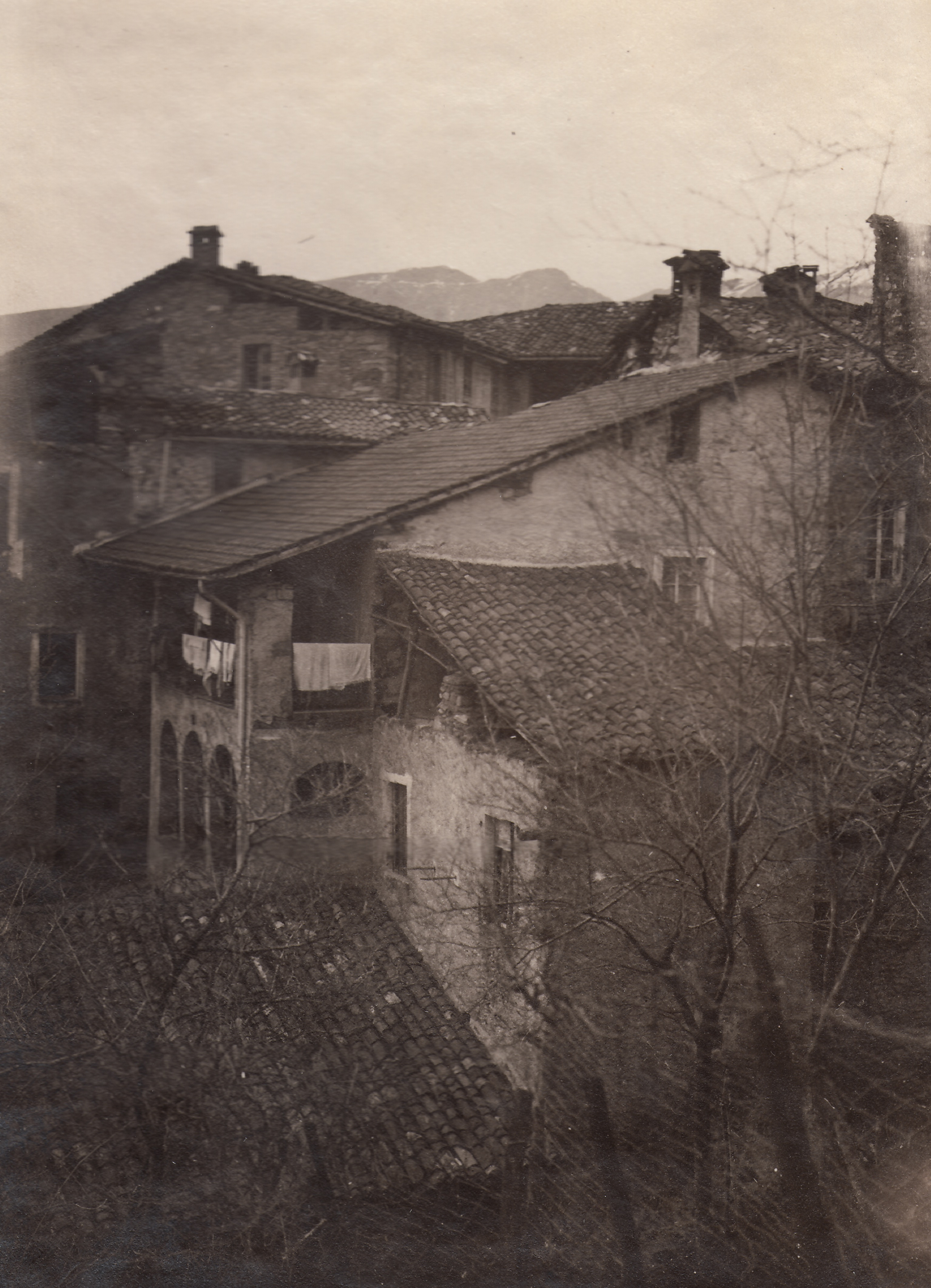 Blick auf die ehemalige politische Gemeinde Iseo TI, heute Bioggio, im Jahr 1919, mit dem Monte Lema im Hintergrund.